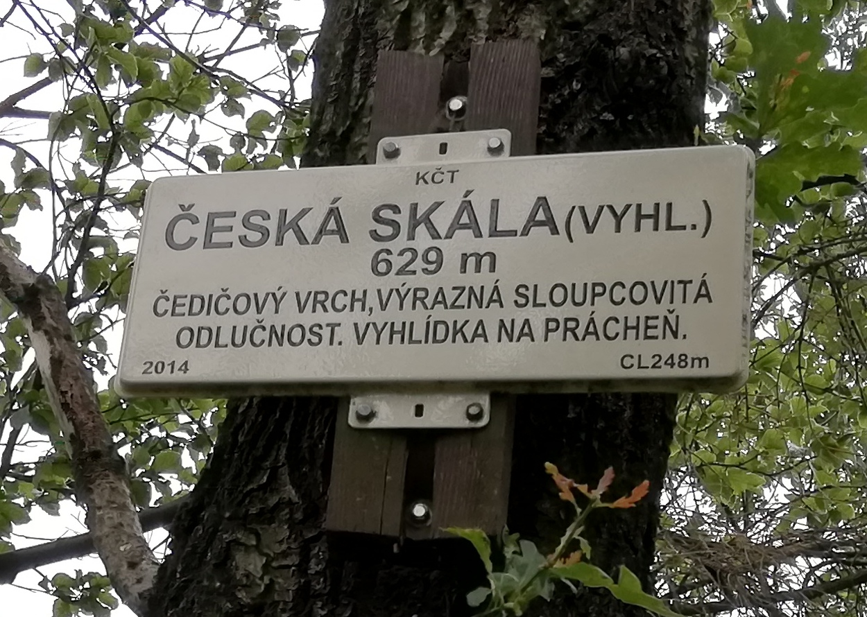 Pohled na vrcholovou informační tabulku na České skále. Česká skála (též Čečka či Češka) je zarostlý kopec v severovýchodní části Českého středohoří, odkud je výhled jen na obec Prácheň u Kamenického Šenova. Je vysoký 629,2 metrů nad mořem, vůči Práchni je jen o 70 metrů výš.